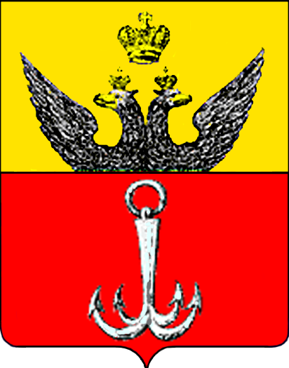 Версія герба міста Одеси, прийнята на початку 1800-х років. Із прийнятого у 1798 році герба прибрано мальтійський хрест, змінено вигляд якора.